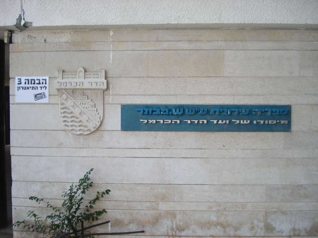 שלט בכניסה לספריית פבזנר בחיפה